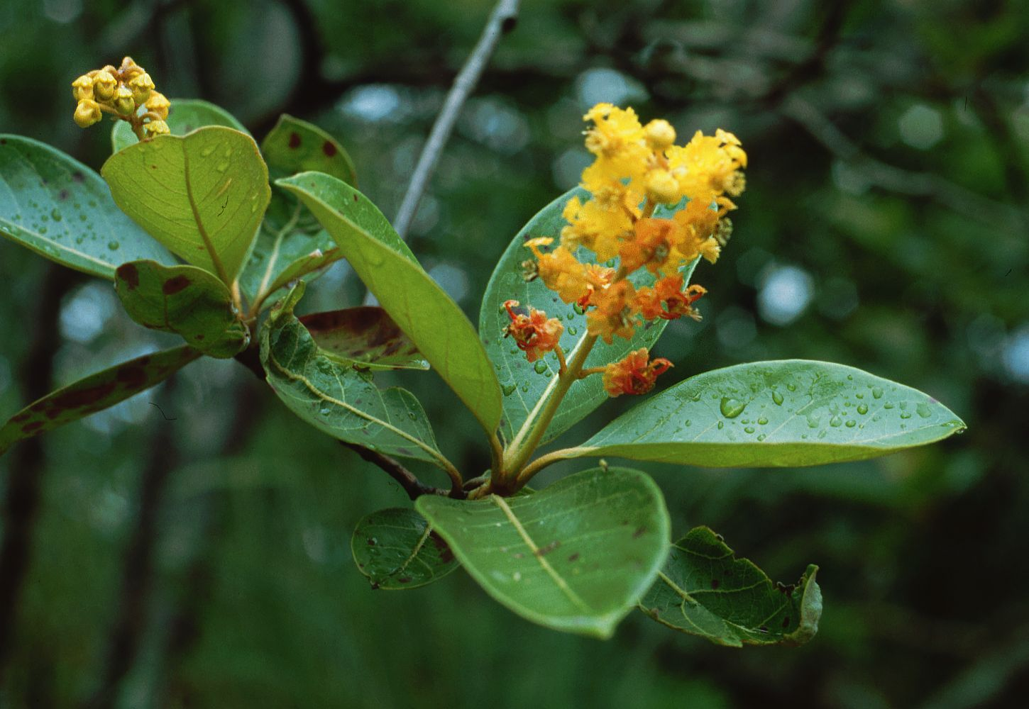 Byrsonima crassifolia, Malpighiengewächse (Malpighiaceae) – Costa Rica: Prov. Guanacaste, Cordillera de Guanacaste, Parque Nacional Rincón de la Vieja